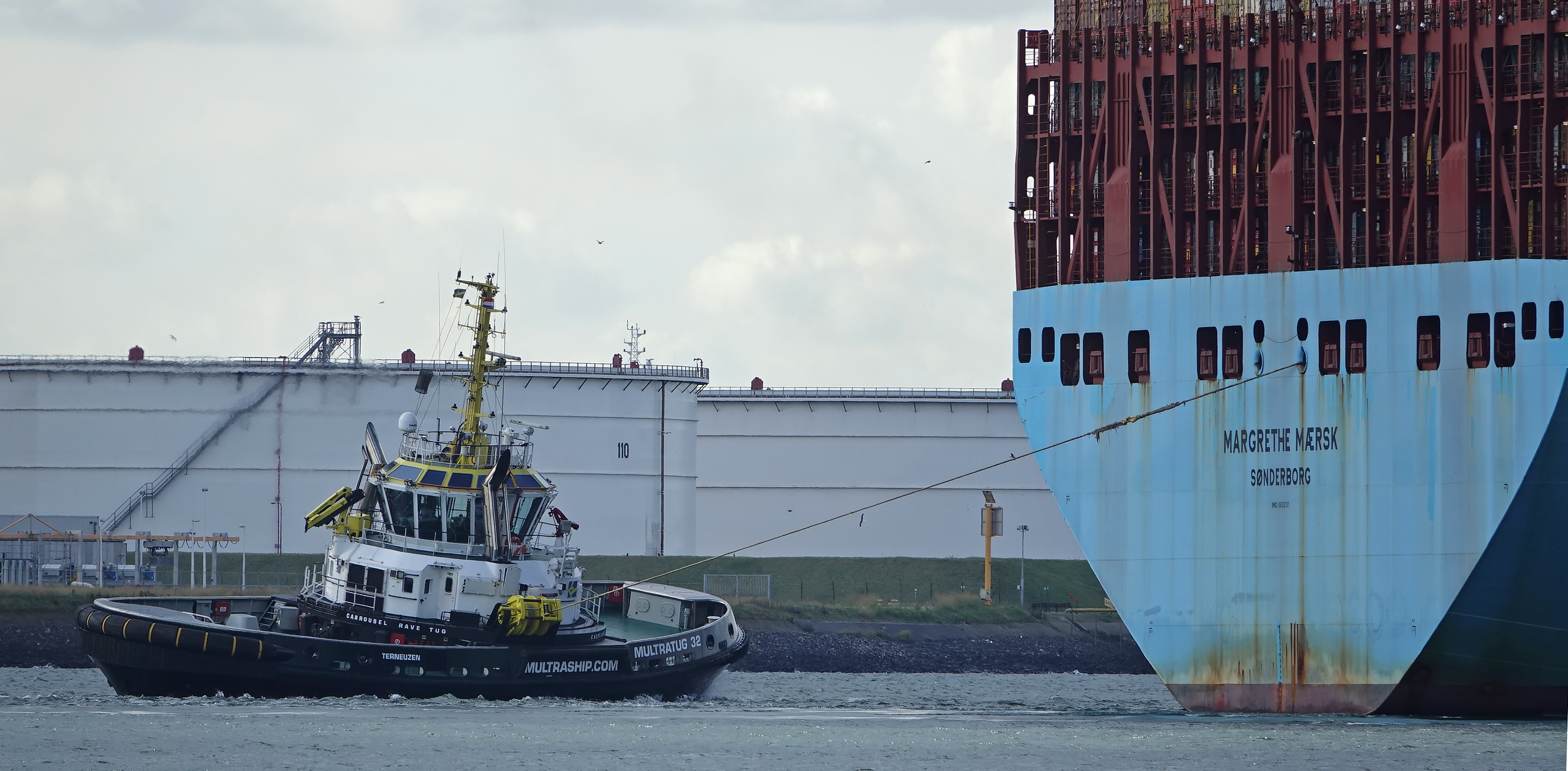 Gezien in Europoort vanaf DE NIEUWE PRINS 8-8-2019